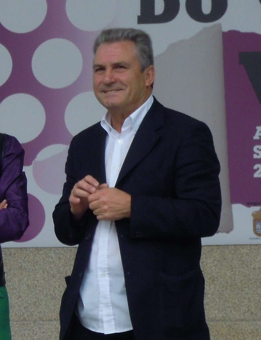 José Luis Poceiro Martínez, alcalde de Vilaboa, na V mostra do viño de Vilaboa